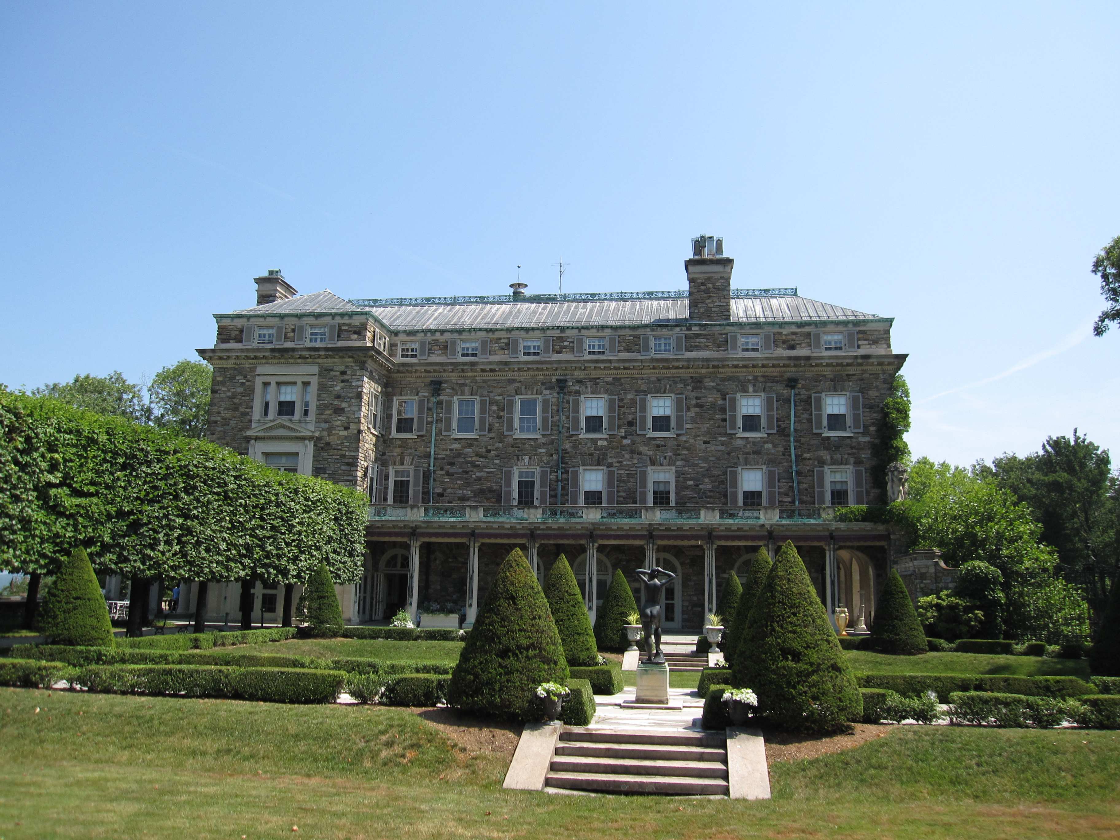 Kykuit